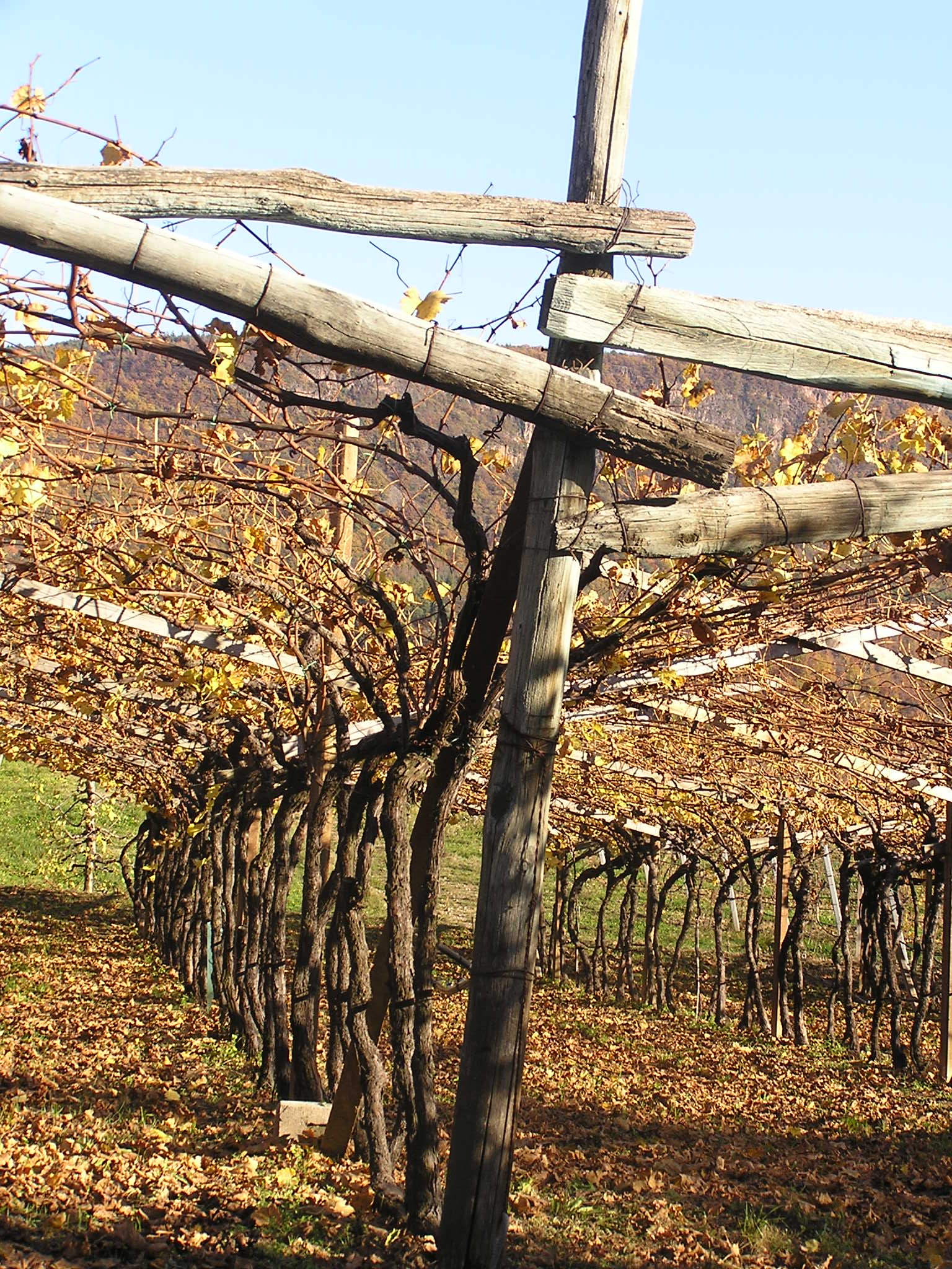 Weinlaube: Aufnahme im Herbst 2011 in Südtirol